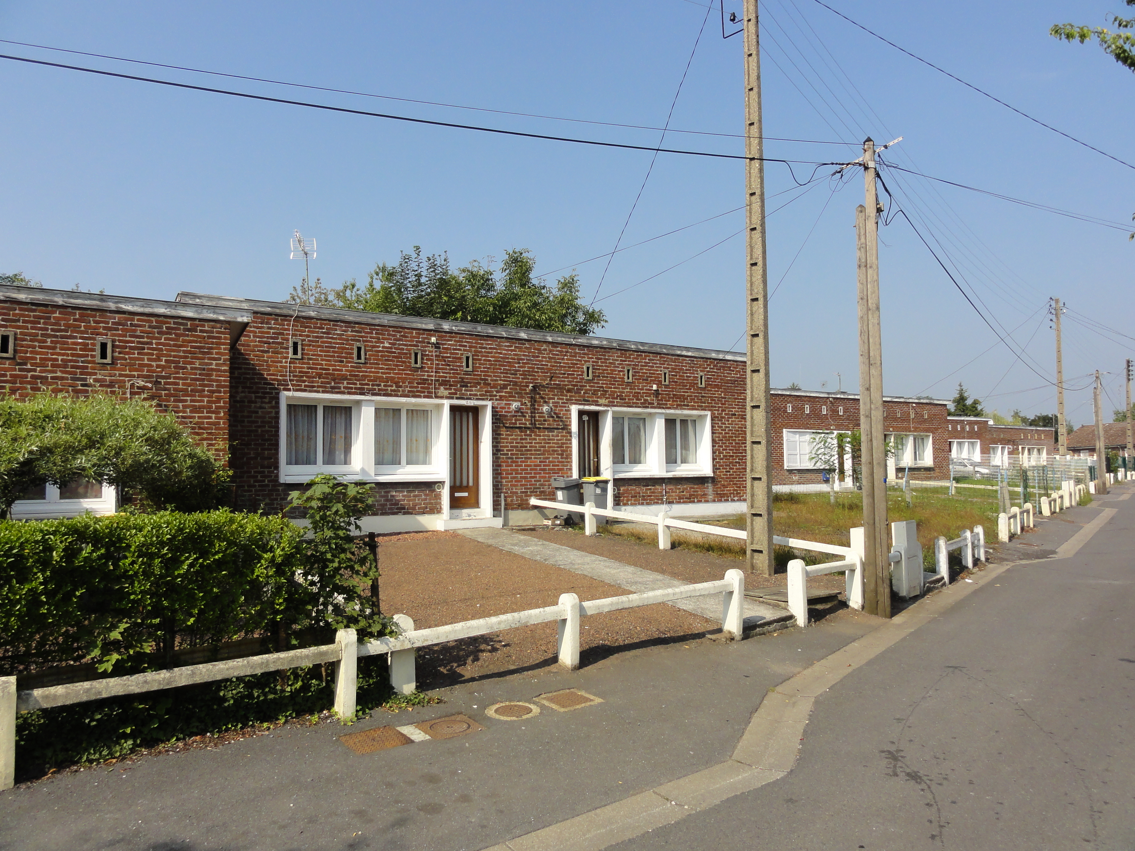 Cités des fosses Soult de la Compagnie des mines de Thivencelle, Fresnes-sur-Escaut, Nord, Nord-Pas-de-Calais, France.